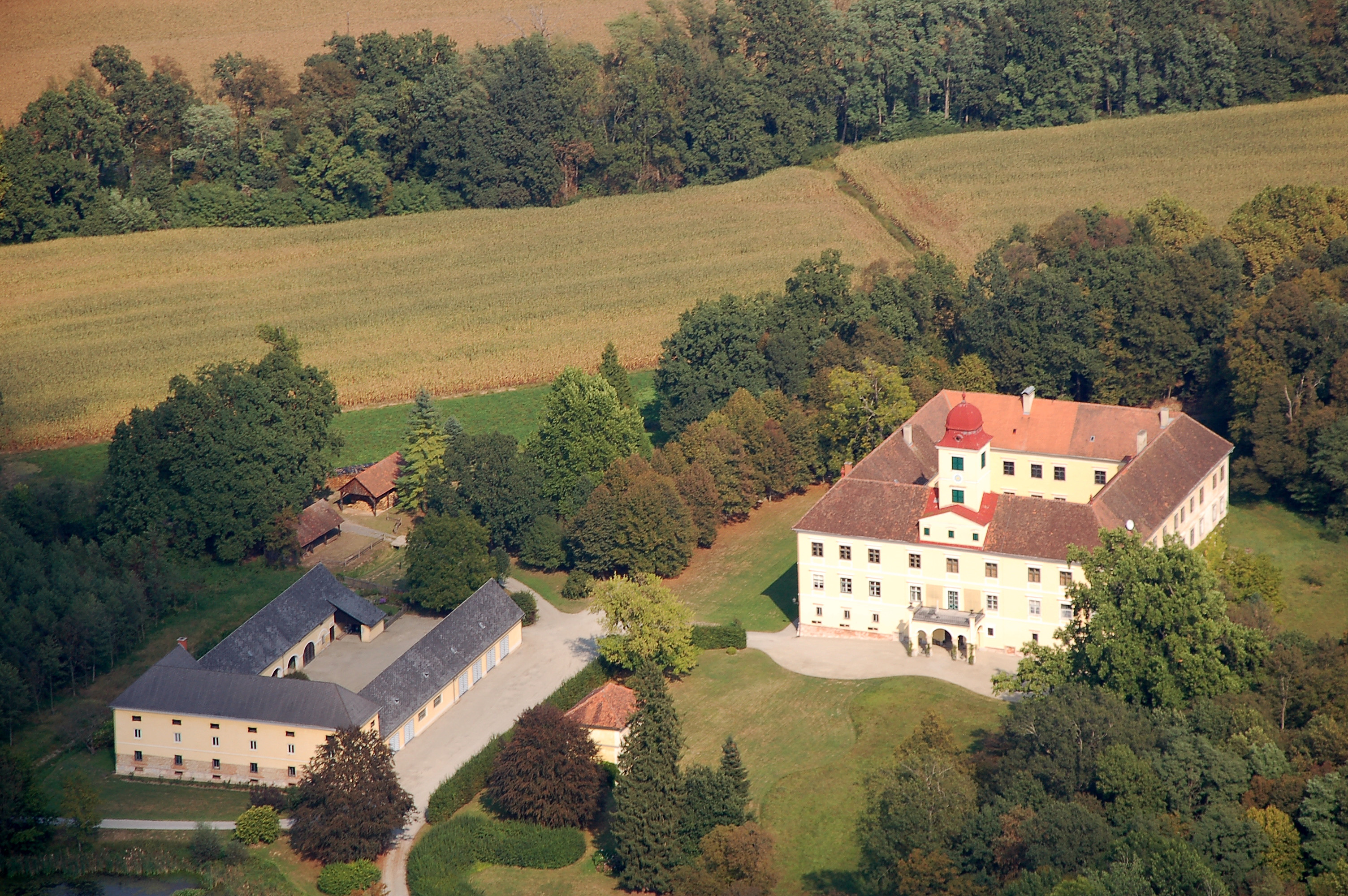 Schloss Brunnsee mit Wirtschaftsgebäude